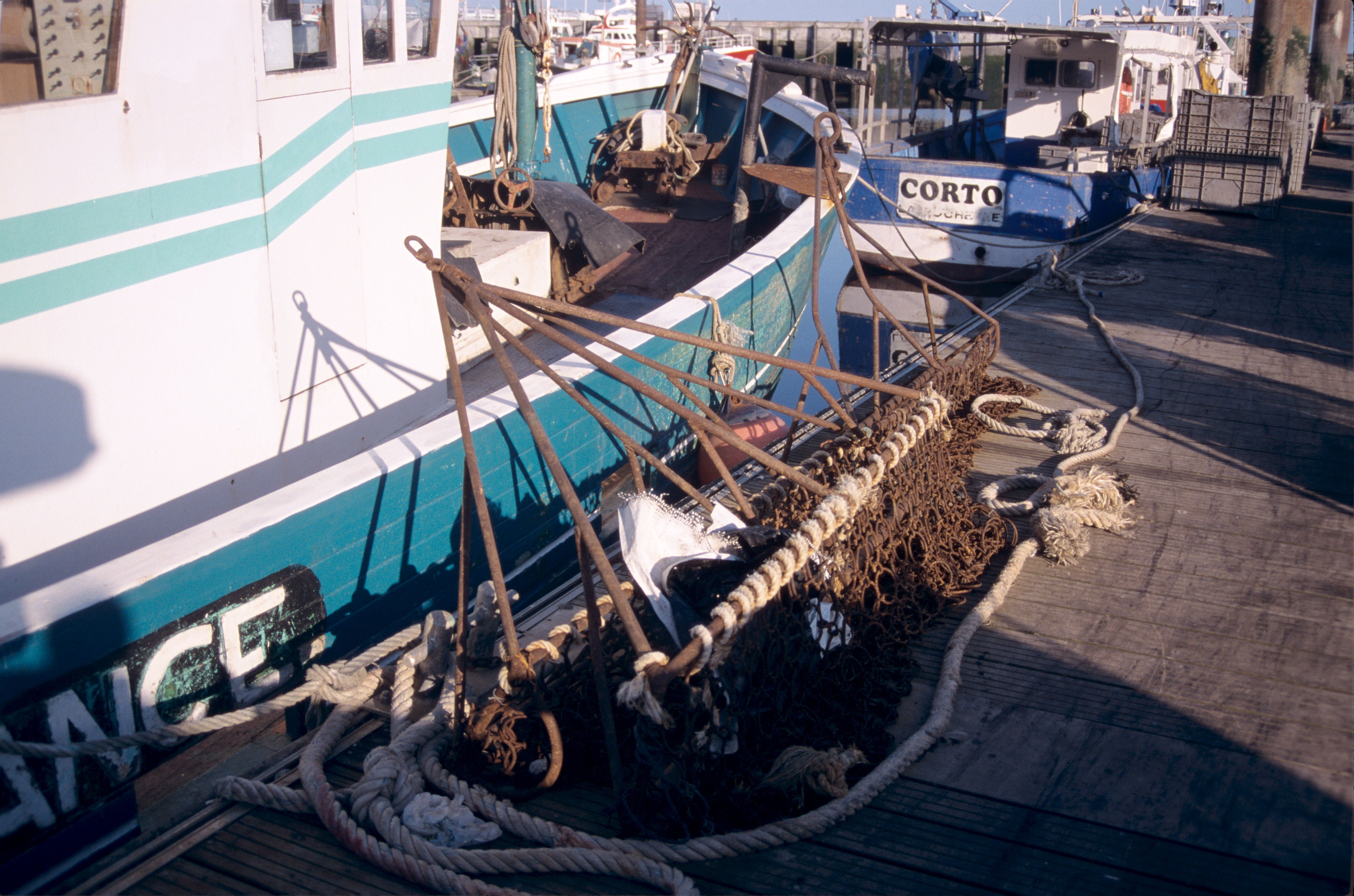 Une drague de pêche posée le long d'un bateau. Une drague de pêche est constituée d'un panier (en métal ou filet) fixé à une armature rigide. Elle est utilisée pour la pêche des coquillages. Port de pêche de Chef de Baie, La Rochelle, Charente Maritime, France.